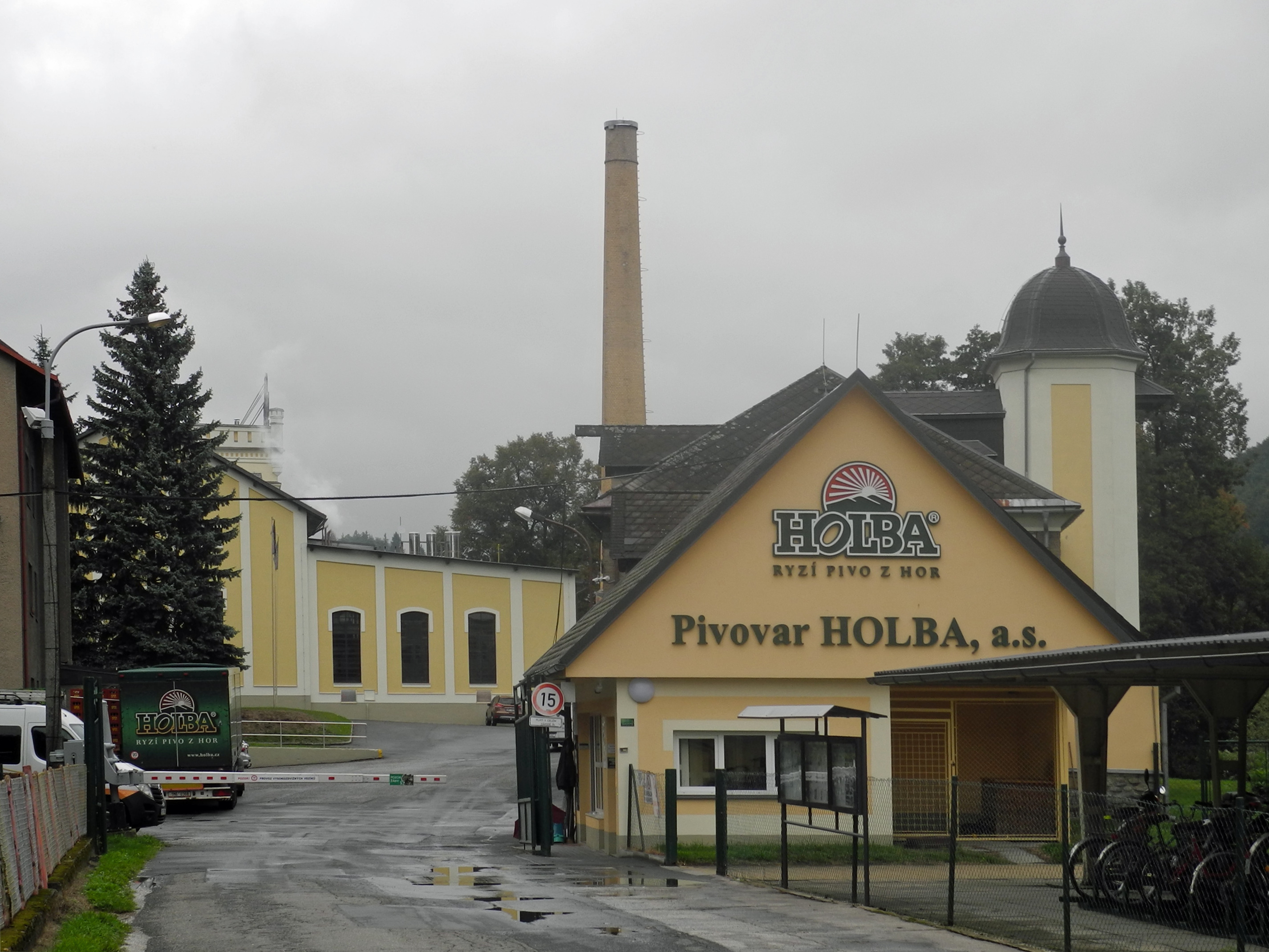 Brauerei Holba (ehem. Brauerei von Chiari & Co. in Halbseit) in Holba, OT von Hannsdorf (Hanušovice)